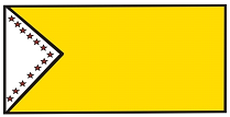 Bandera de la Parroquia Abdón Calderón